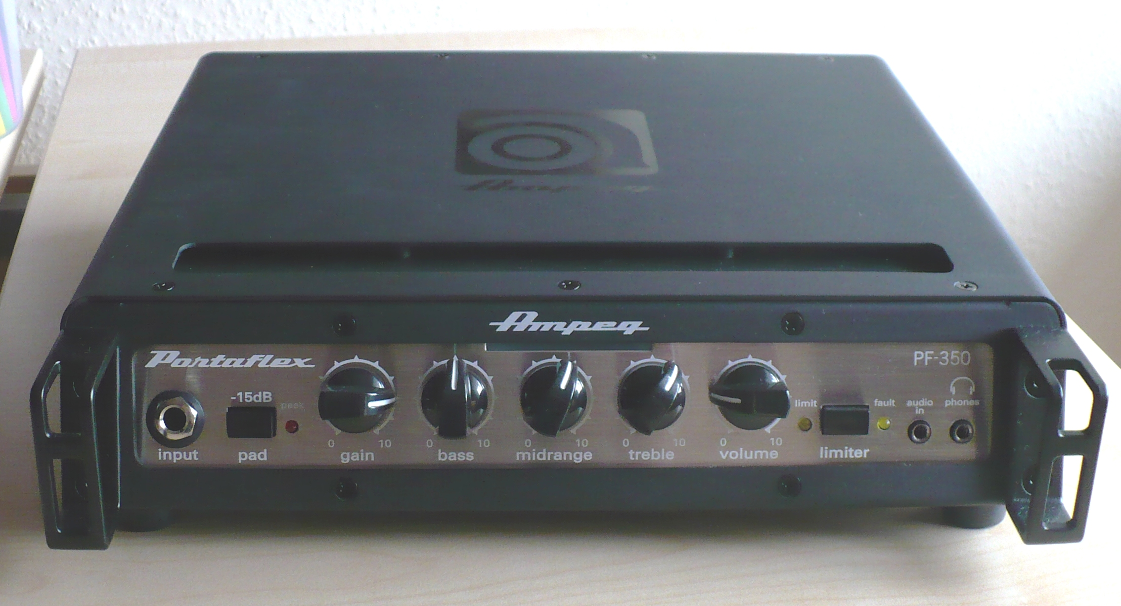 Ampeg Portaflex PF 350 Transistor Head References Ampeg: Portaflex Series - PF-350. Ampeg. "Ampeg’s Portaflex PF-350 delivers legendary Ampeg tone in an ultra-compact design that pushes out a hefty 350W. Tools like a built-in limiter, FX loop and direct out provide flexibility for the gigging bassist. Pair it with our PF Series flip-top cabinets for the vintage styling and portability of Ampeg’s iconic Portaflex originals.", "SPECIFICATIONS: RMS power output: 350W @ 4 ohms Preamp: Solid-state Power amp: Class D Tone controls: Bass, mid, treble Onboard limiter Balanced direct out FX loop 1/8” headphone out / line in -15dB input pad Power supply: switching Dimensions ( H x W x D inches): 2 x 11 x 11 Handling weight: 8 lbs / 3.6 kg"